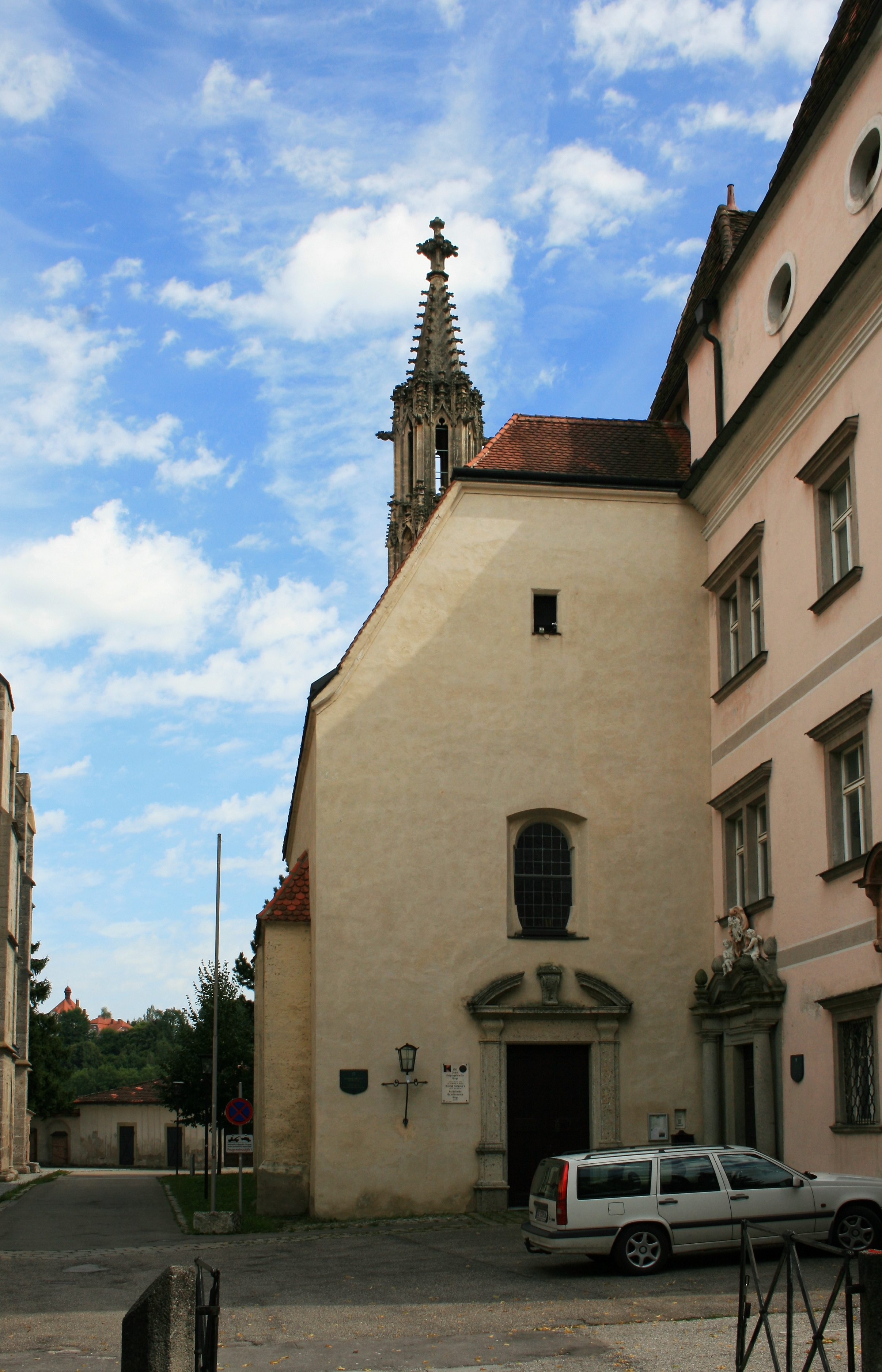 Die Margaretenkapelle neben der Steyrer Stadtpfarrkirche